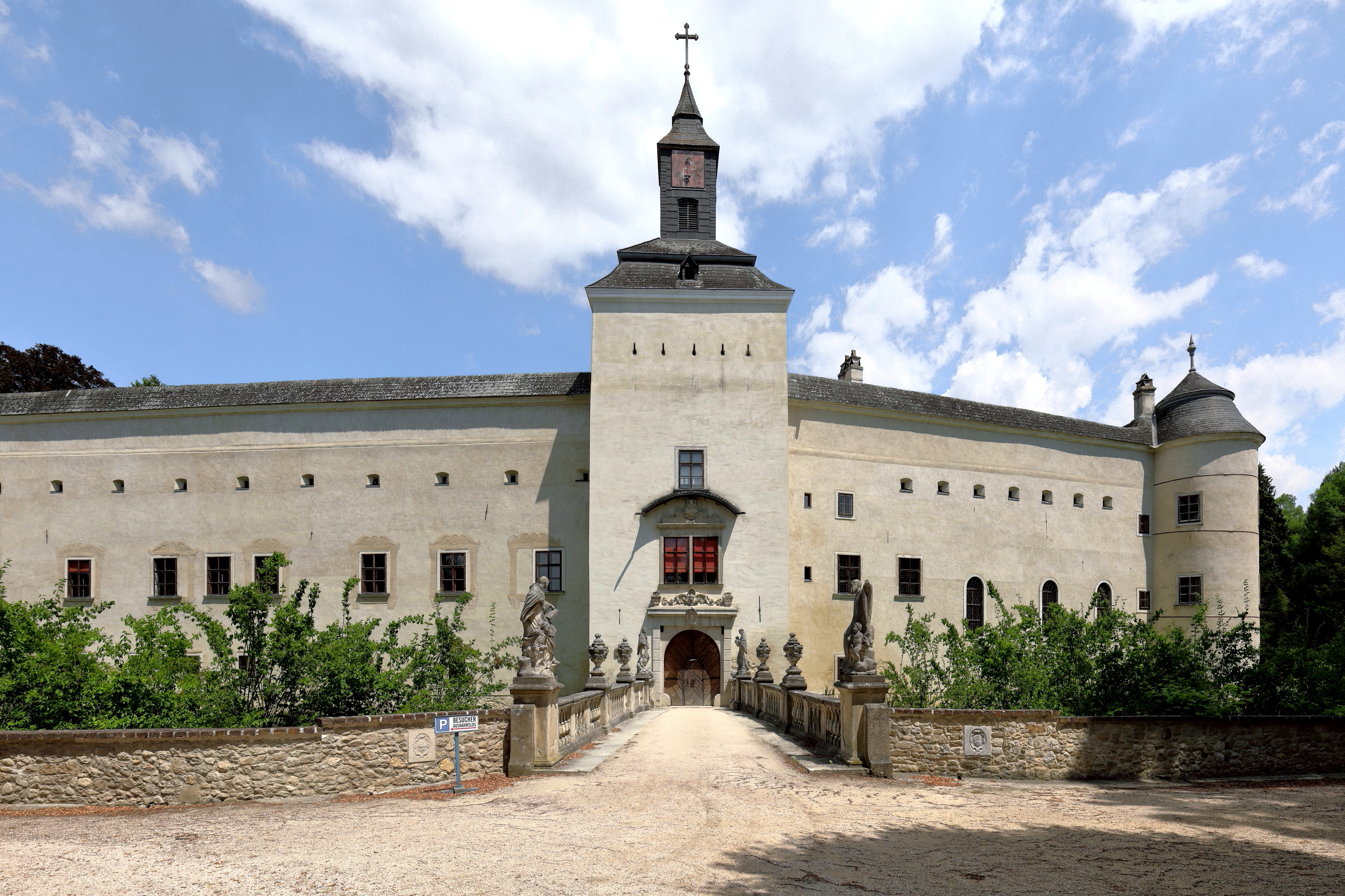 Südwestansicht des Schlosses in der niederösterreichischen Gemeinde Niederleis.Ursprünglich eine mittelalterliche Wehranlage mit Wassergraben wurde sie zur Renaisancezeit prägend umgebaut und später teilweise barockisiert. Während der sowjetischen Zwangsverwaltung blieben nur die unbeweglichen Schätze zurück.